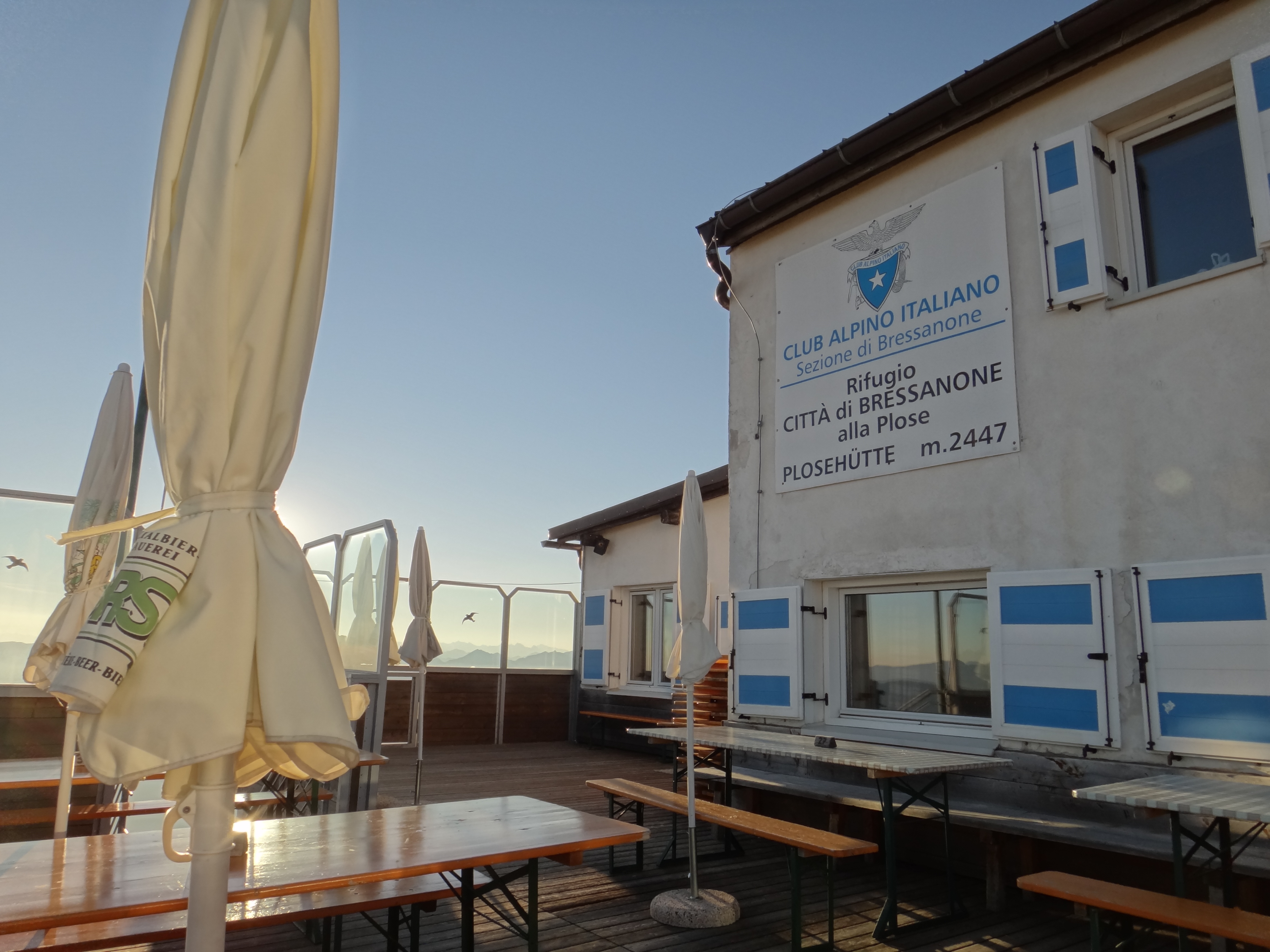 Dolomites - Alta Via 2: Stage 01-11 Bressanone (Rifugio Plose) to Rifugio Genova